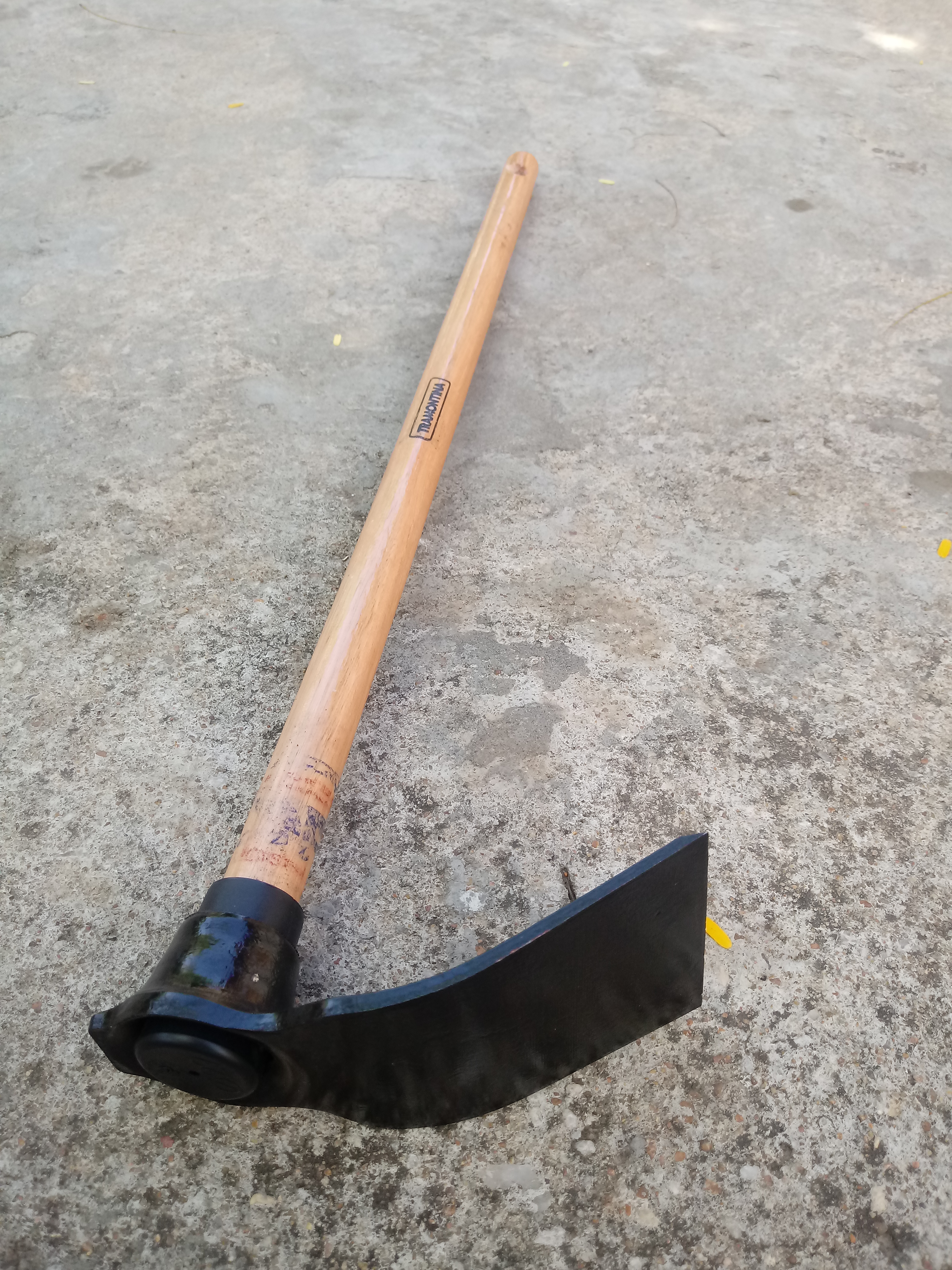 Enxó no Brasil, da metalúrgica Tramontina.